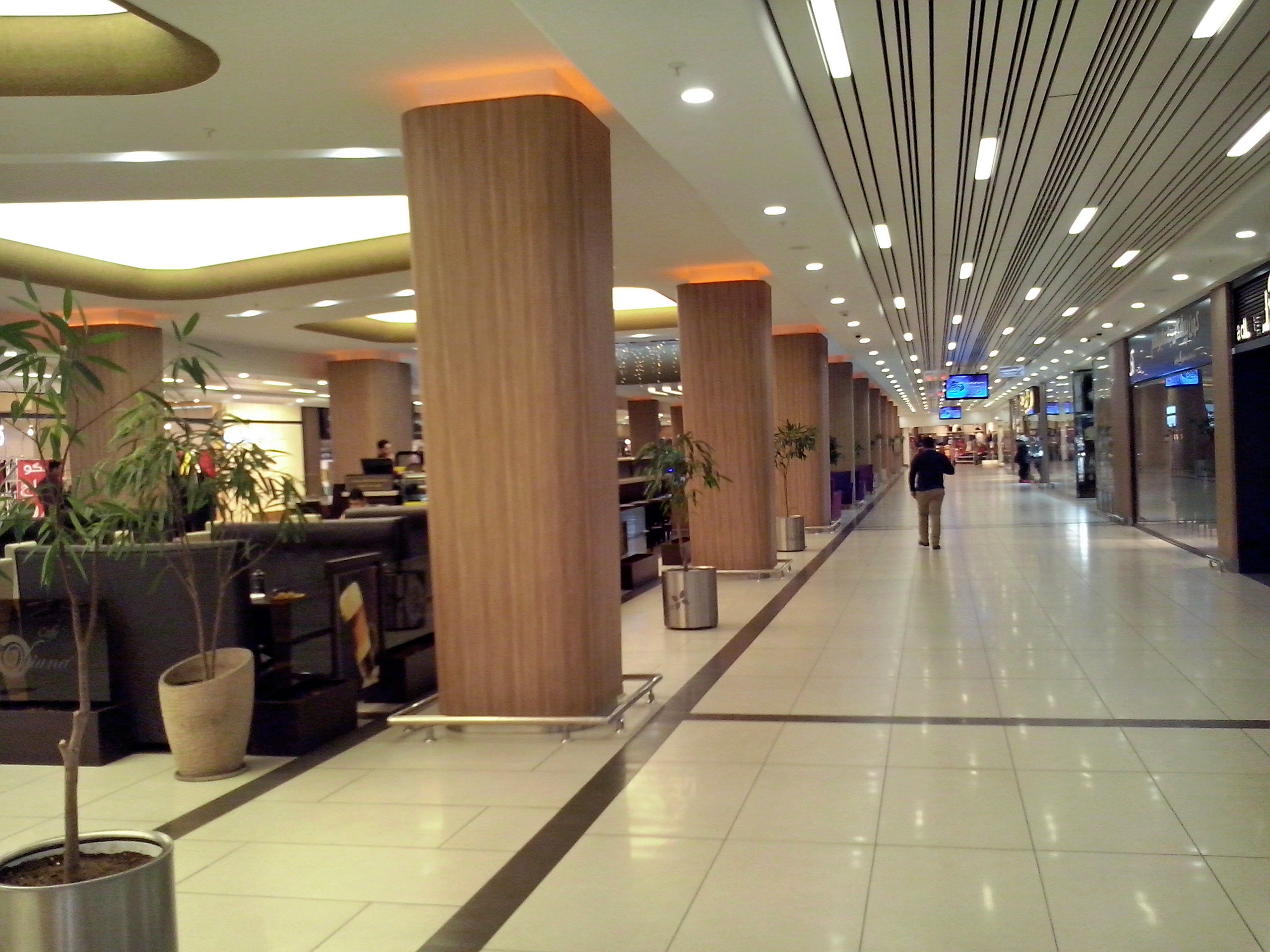 مجتمع تجاری لاله پارک تبریز